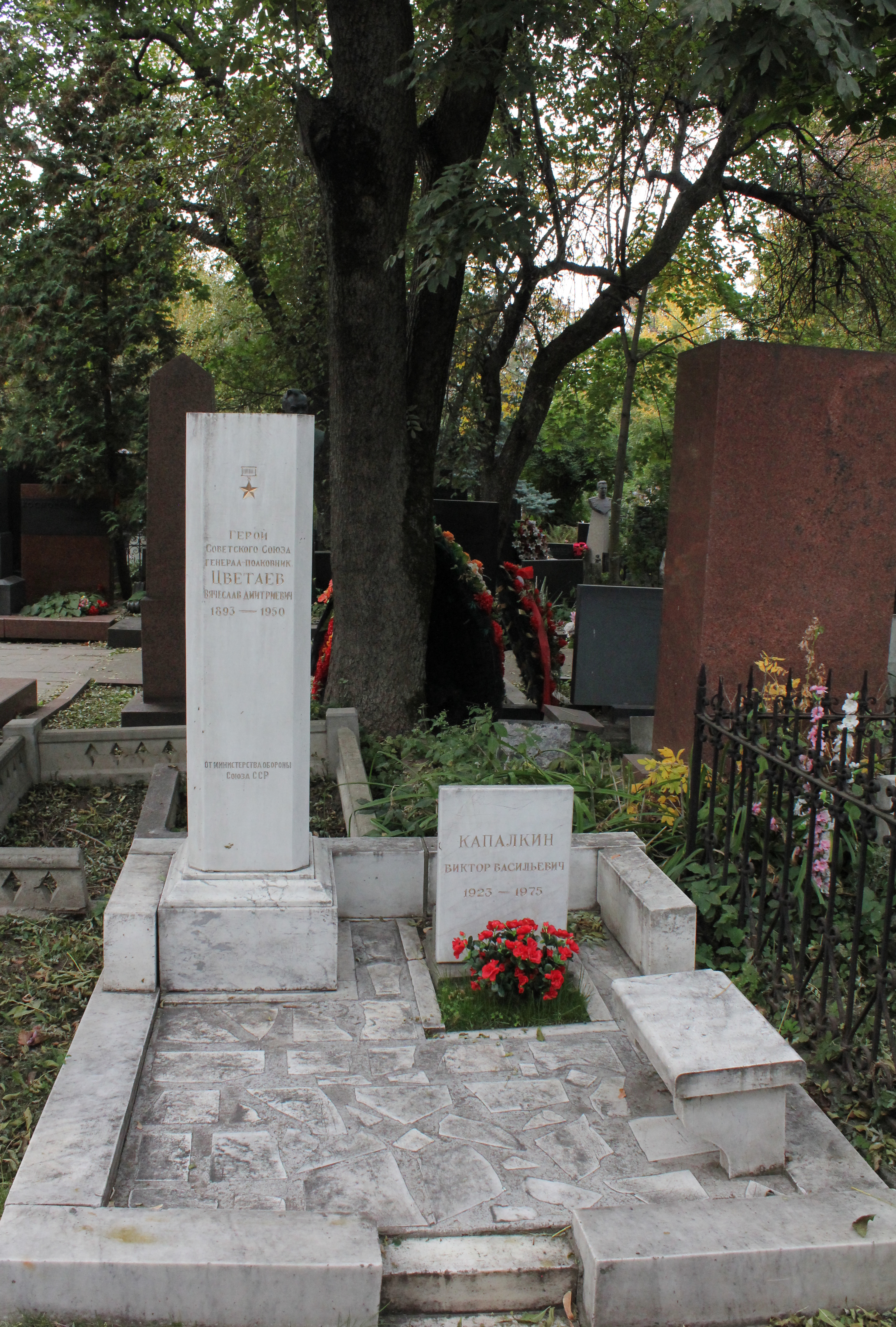 Могила, в которой похоронен Цветаев Вячеслав Дмитриевич (1893-1950), Герой Советского Союза: Новодевичье кладбище, Хамовники, Центральный округ, Москва